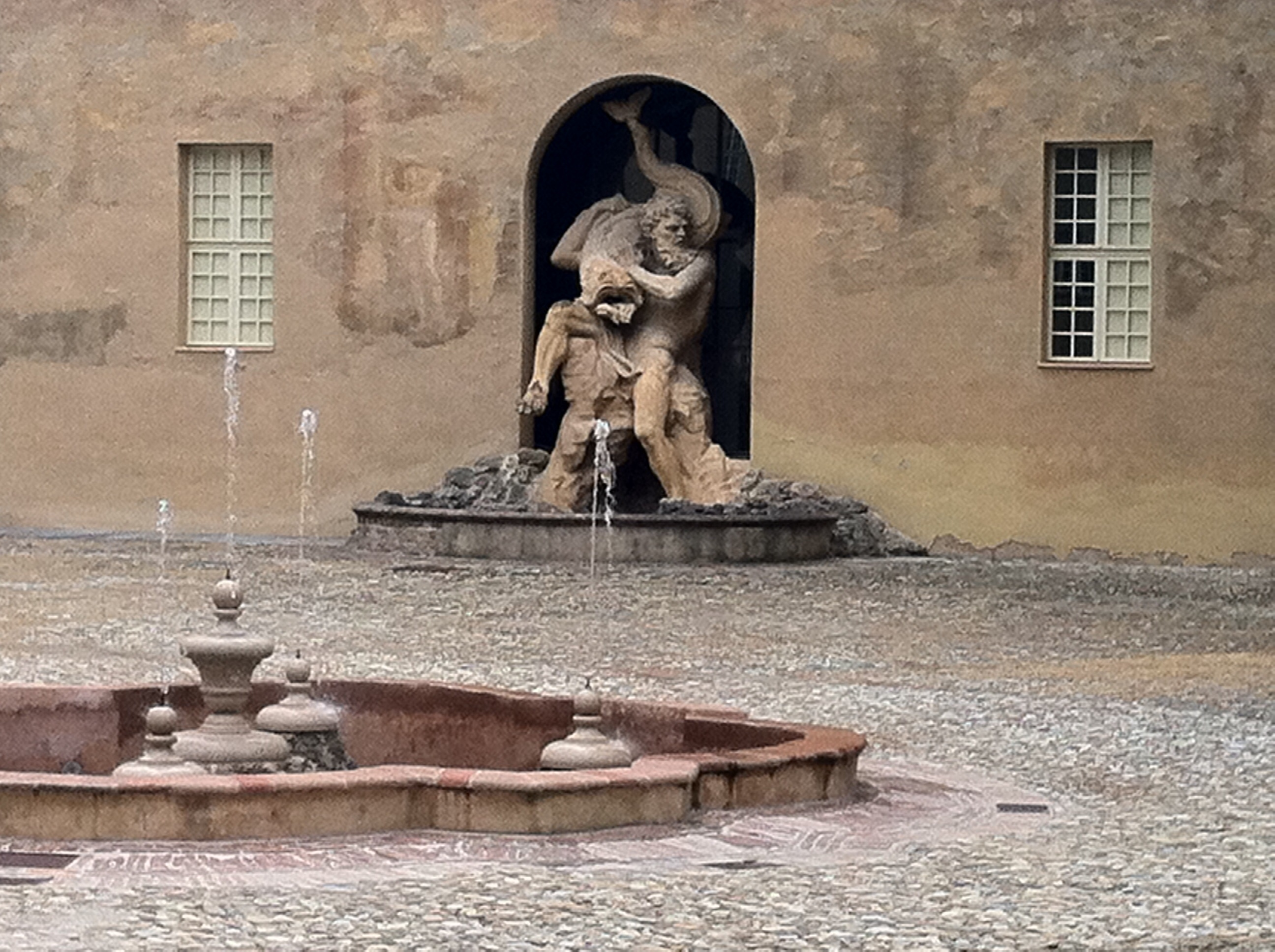 Palazzo Ducale - MIBAC This is a photo of a monument which is part of cultural heritage of Italy.